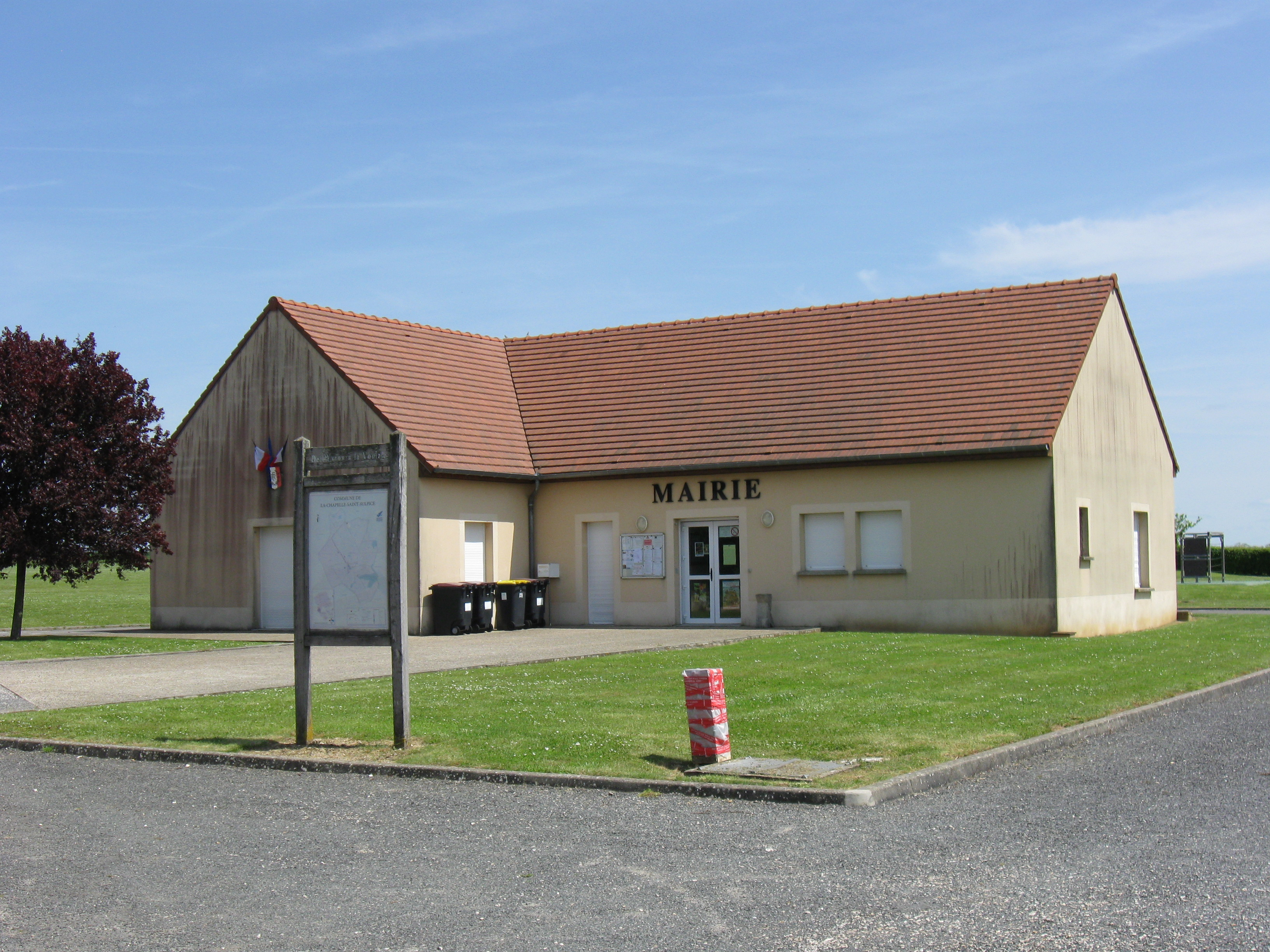 Mairie de La Chapelle-Saint-Sulpice. (Seine-et-Marne, région Île-de-France).